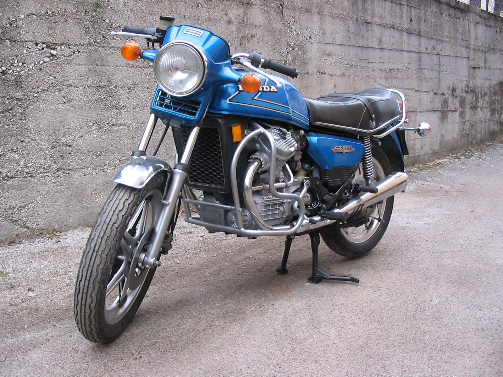 La mia Honda cx500 del '79.orgogliosamente restaurata! Sabino Sabs